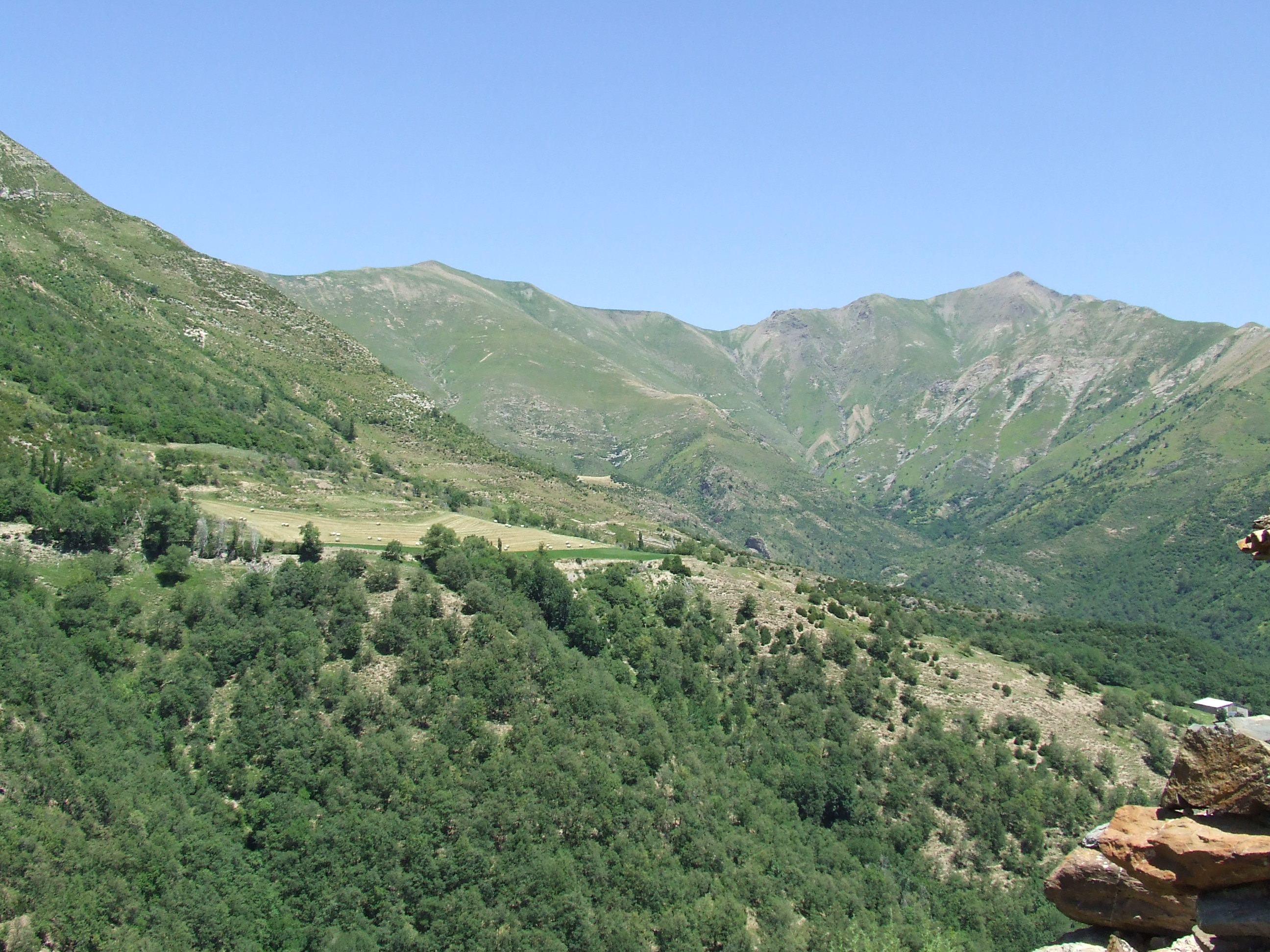 Barranc de Peranera: capçalera (Malpàs, el Pont de Suert)